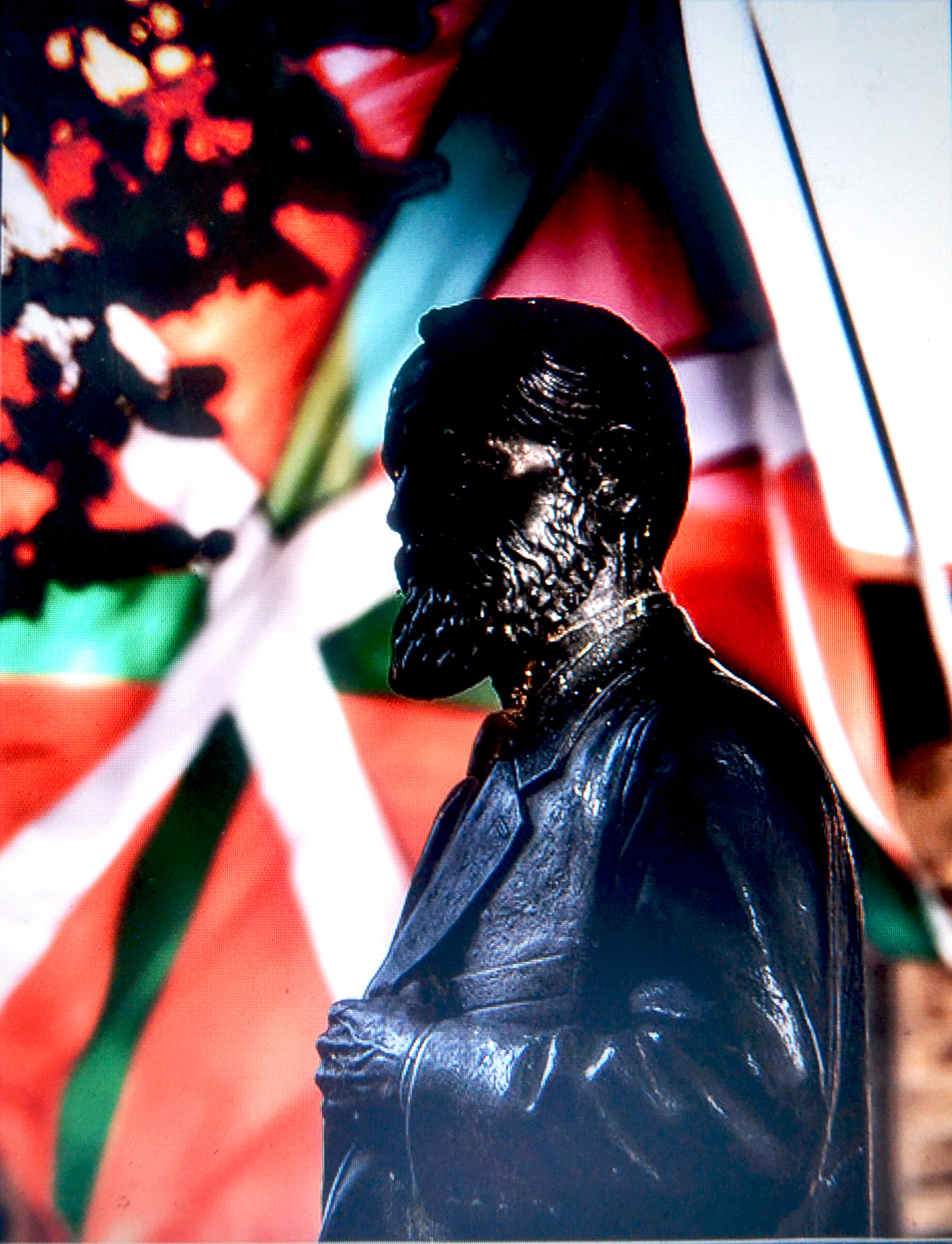 Sabin Arana Goiriren estatua eta Ikurrina. Bilbo, Bizkaia. Euskal Herria. - Sabino Arana Goiri's statue and the Ikurrina (Basque National Flag). Bilbao, Bizkaia. Basque Country.